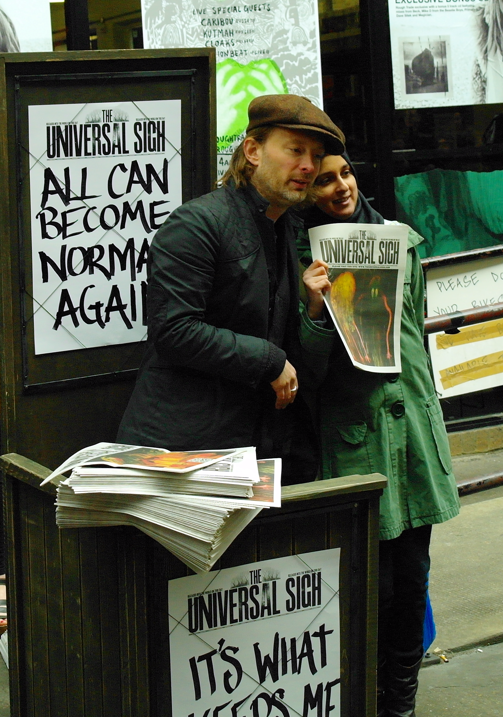 Thom Yorke distribuyendo en Londres el periódico The Universal Sigh como parte de la promoción del álbum de Radiohead The King of Limbs en marzo de 2011.